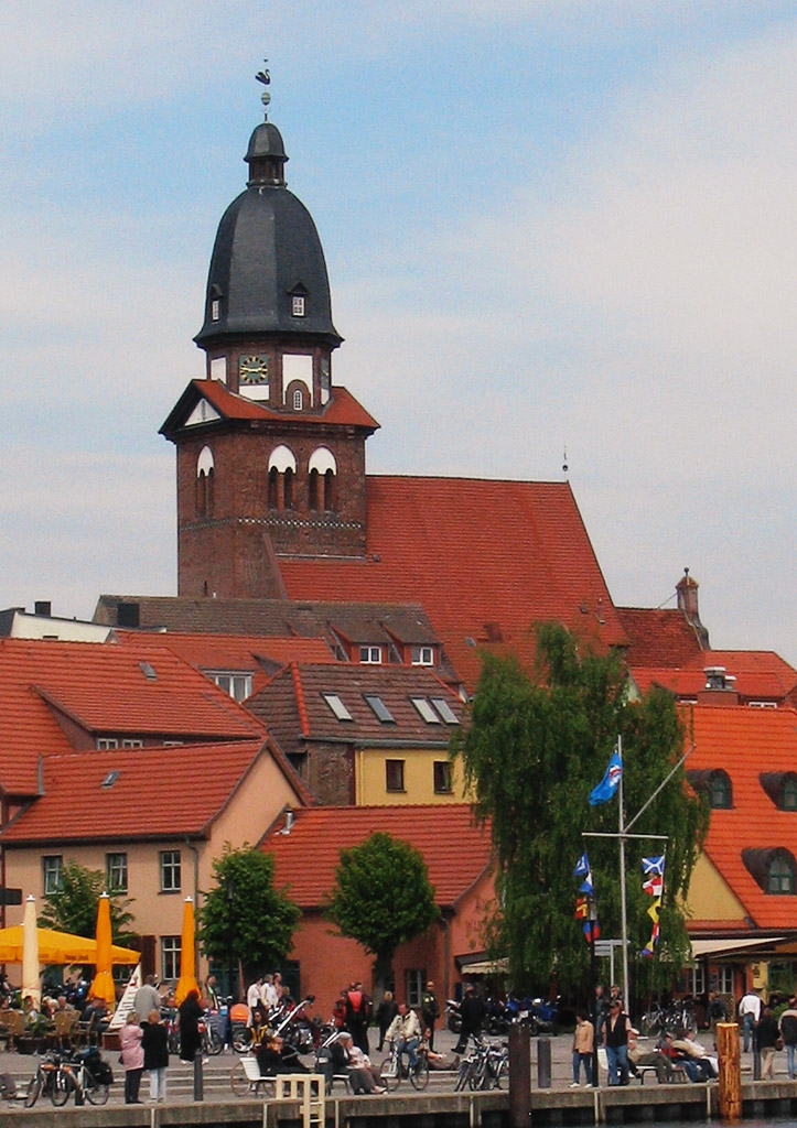 Beschreibung: Waren (Müritz) - Marienkirche Fotograf: Darkone, 14. Mai 2005